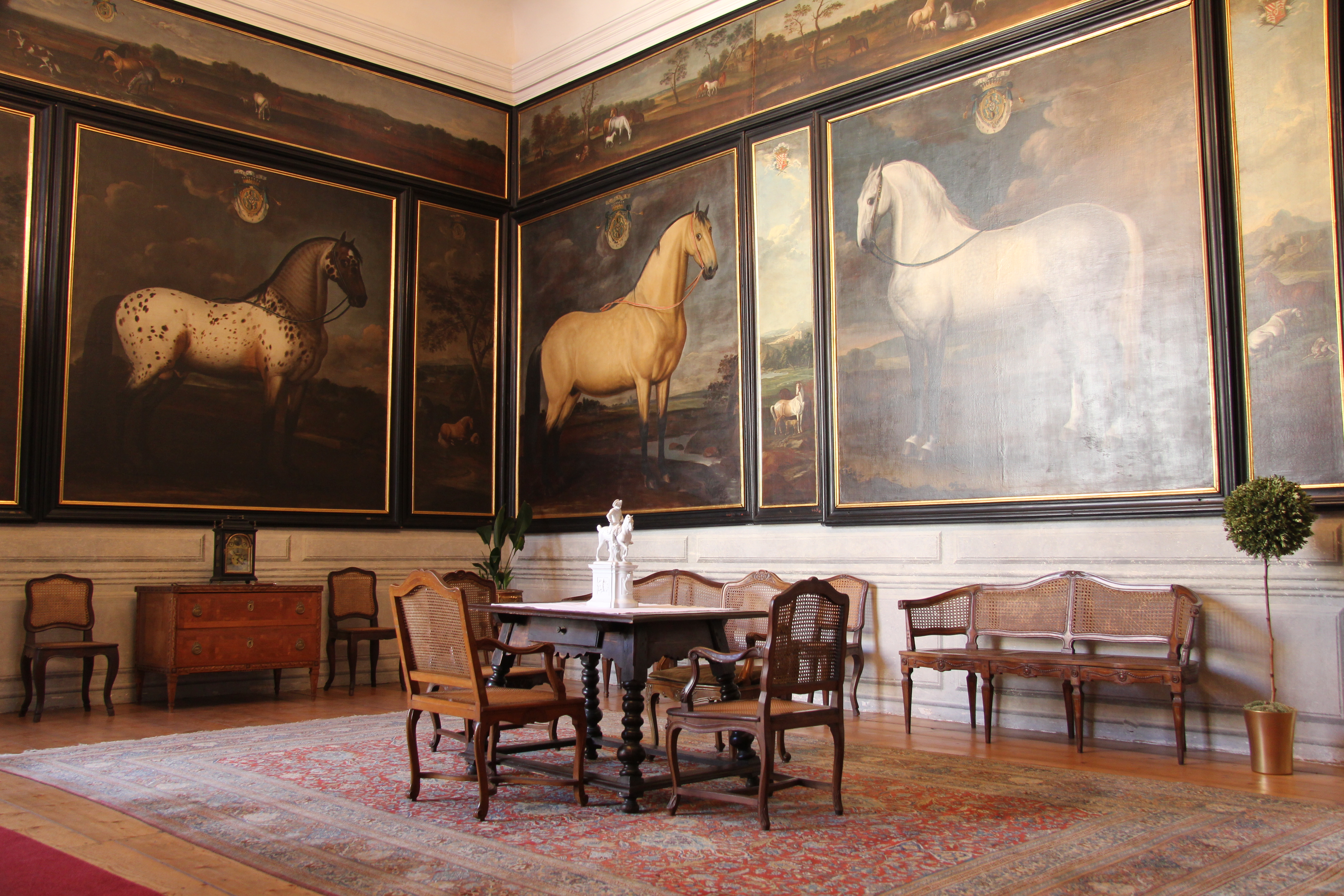 Jezdecká předsíň na zámku v Litomyšli (2017)